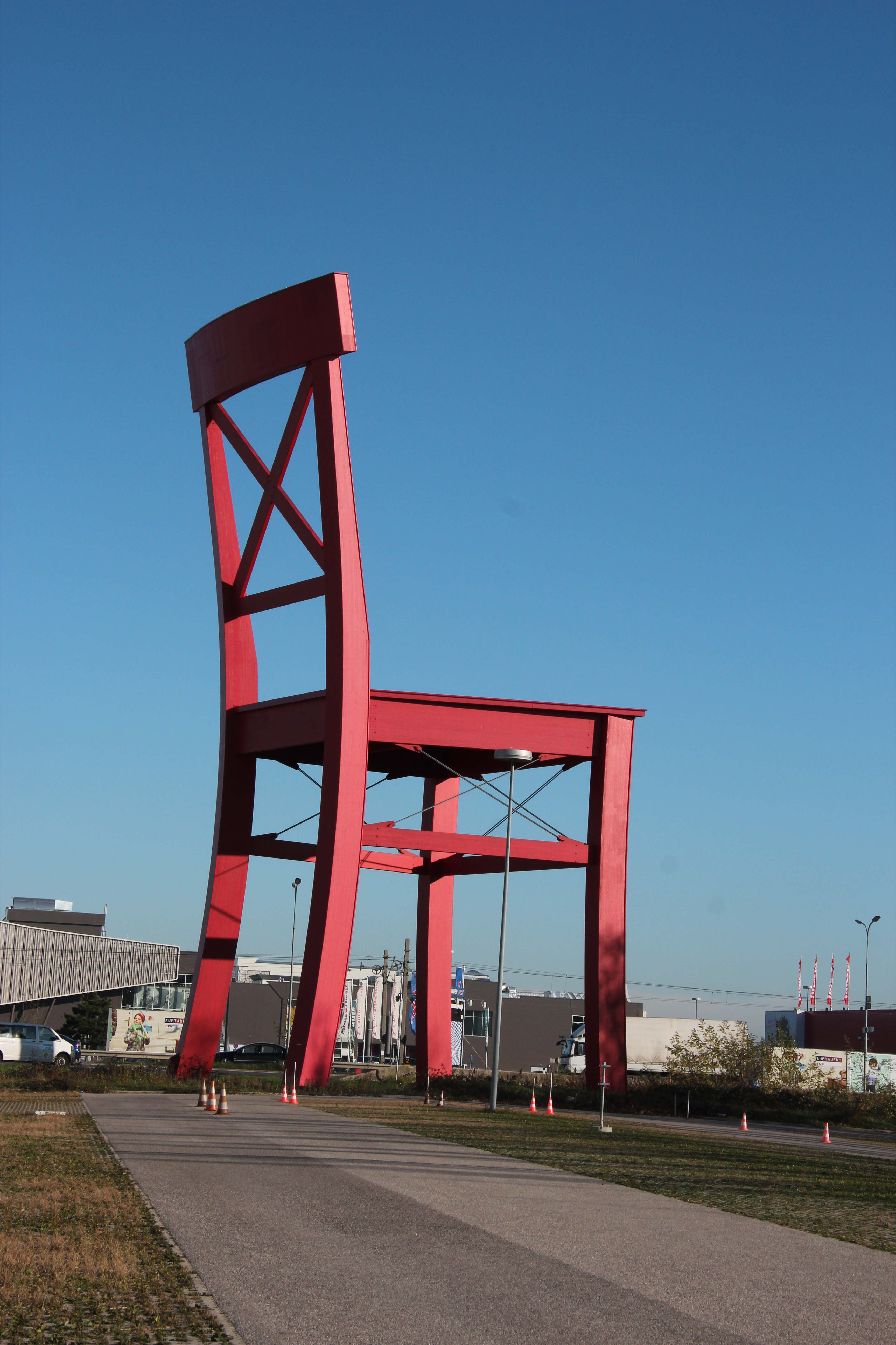 Überdimensionaler Sessel vor einem Möbelhaus (XXXLUTZ) in Brunn, Österreich